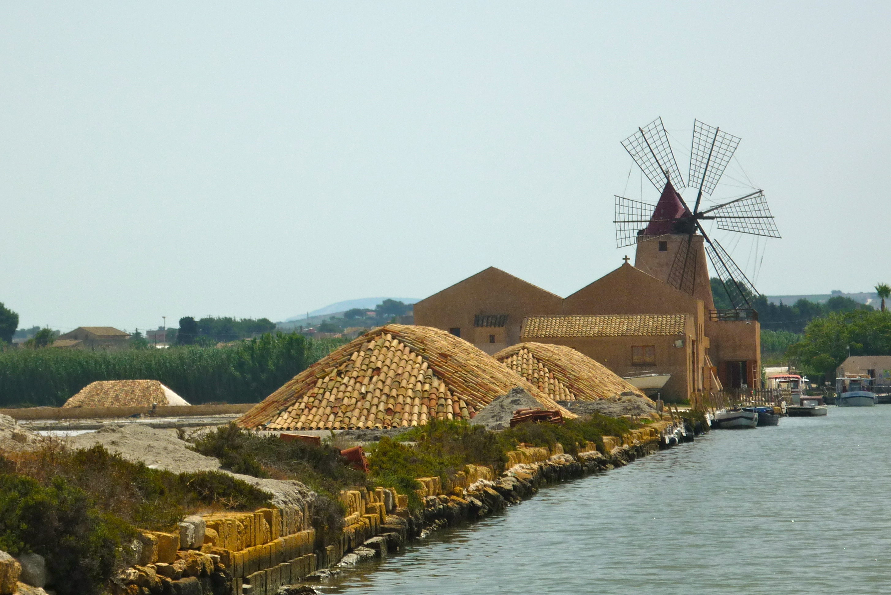 mulino e cumuli di sale dai canali dello stagnone This is a photo of a monument which is part of cultural heritage of Italy. The authorisation for taking photos of this object was provided by the World Wide Fund for Nature Italy.